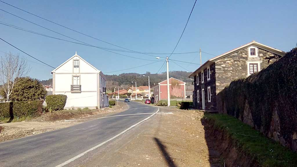 Vista de Martianes, Sedes.